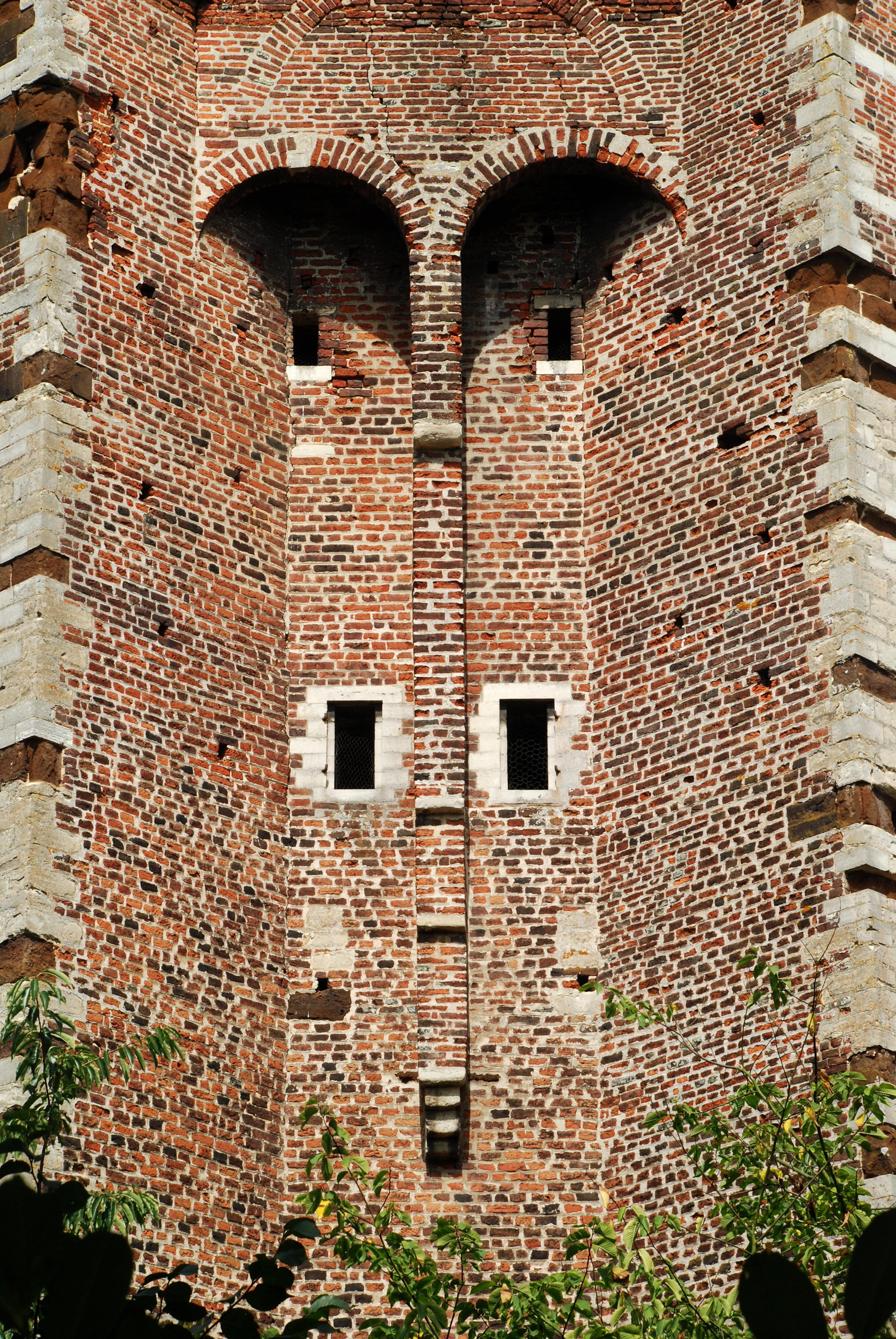 Belgique - Brabant flamand - Donjon Ter Heiden